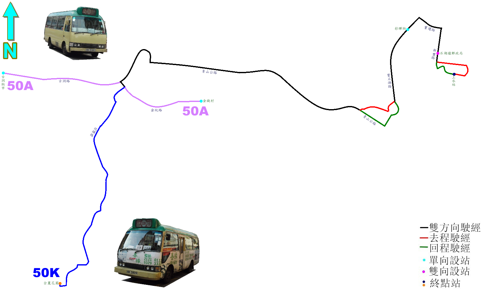 中文（香港）: 新界專線小巴50系列路線的走線圖，當中藍線表示50K才會駛經，而50A線則以淺紫色表示